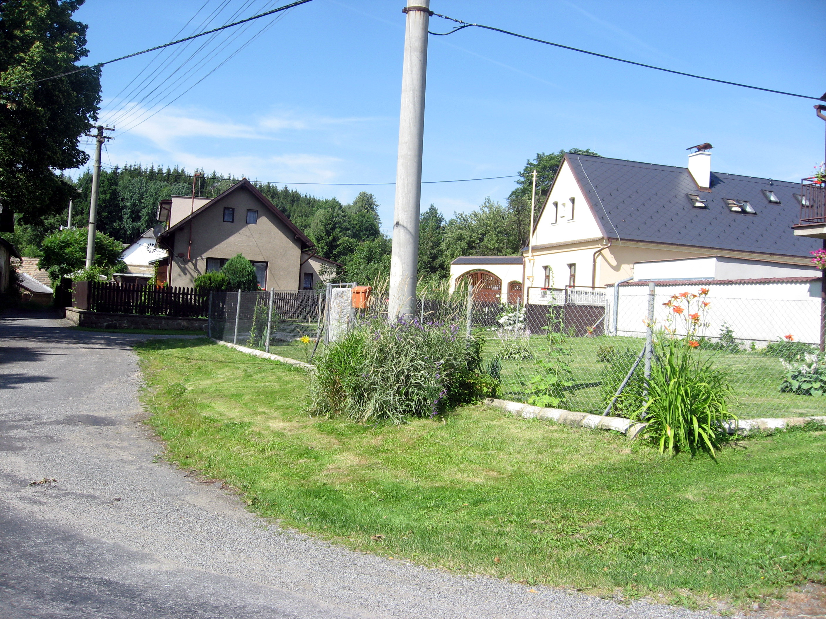 Jedouchov